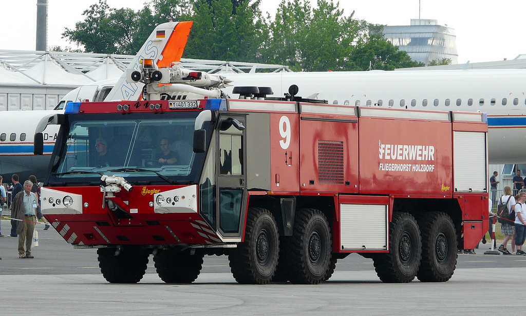 Flugfeldlöschfahrzeuge, hier ein FLF 80/125-12,5 Z8 „Advancer“, wurden extra von dem nahegelegenen Fliegerhorst Holzdorf geholt.